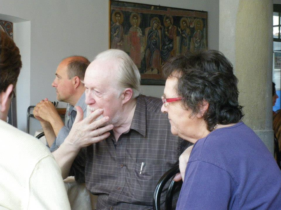 Адольф Овчинников с Еленой Тальябуэ в Школе Сериате, семинар по иконографии 2011 года, организованный центрам Христианская Россия на вилле Амбивери в Сериате